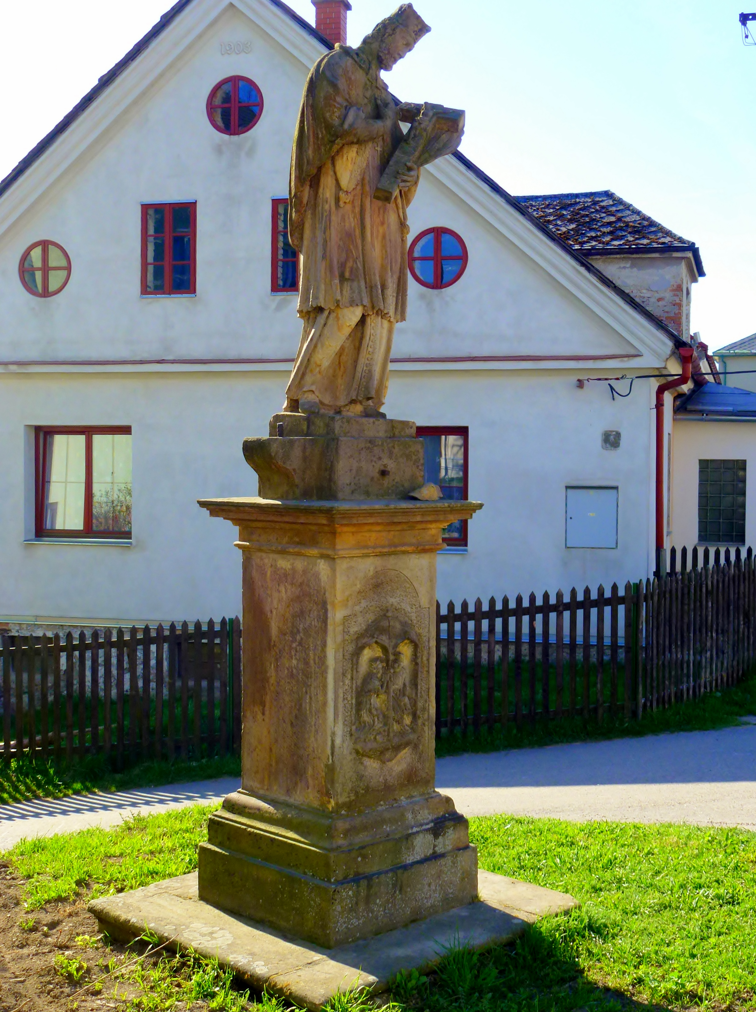 Socha svatého Jana Nepomuckého, Cotkytle.